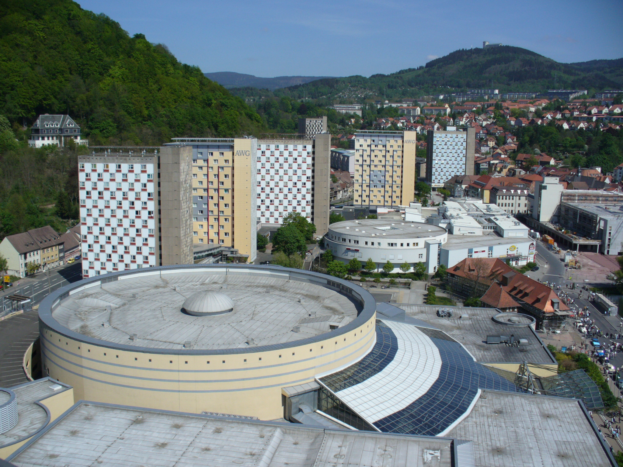 Suhl